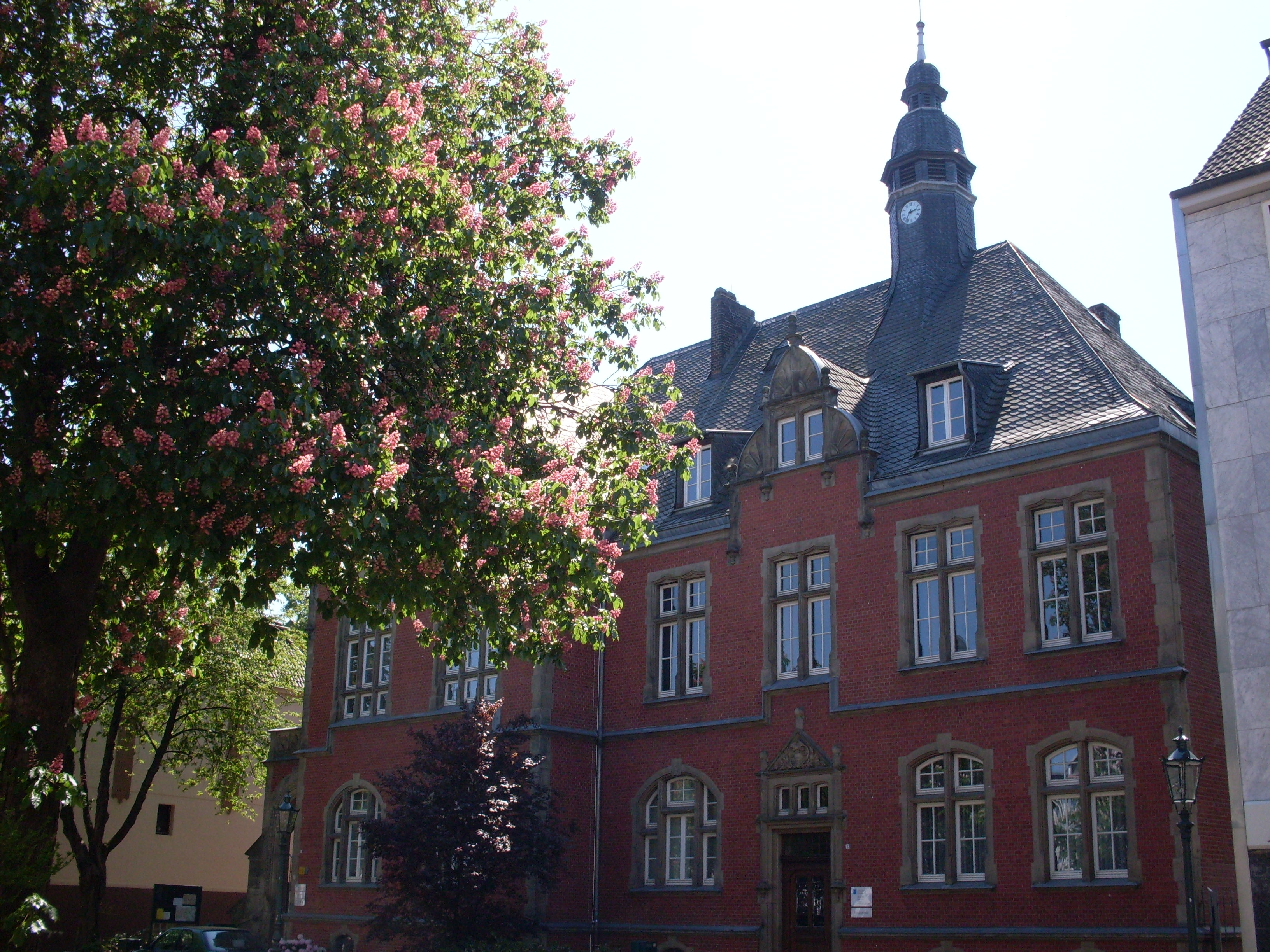 Düsseldorf-Eller, Rathaus des Stadtbezirks 08